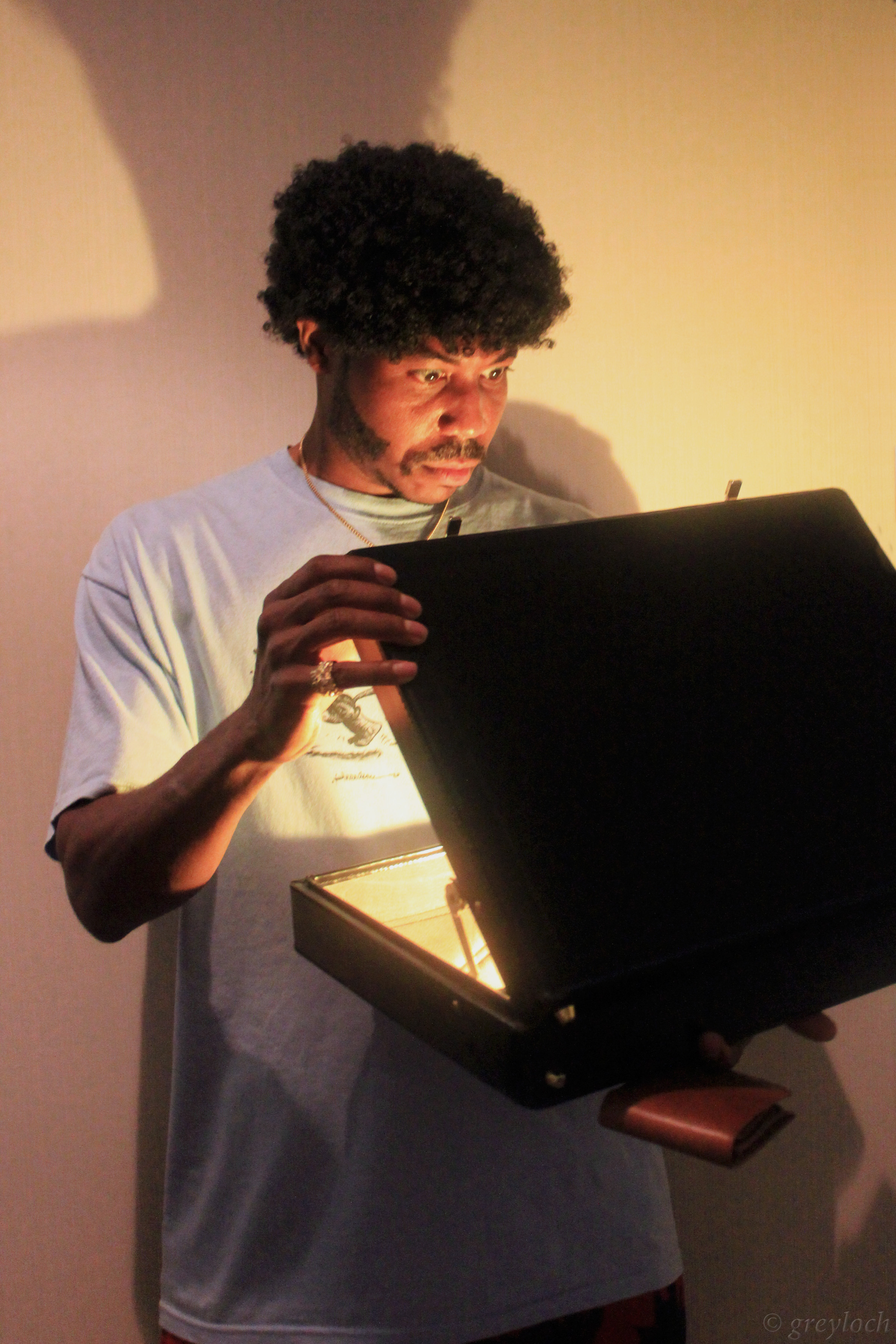 Parodie d'une scène du film Pulp Fiction.